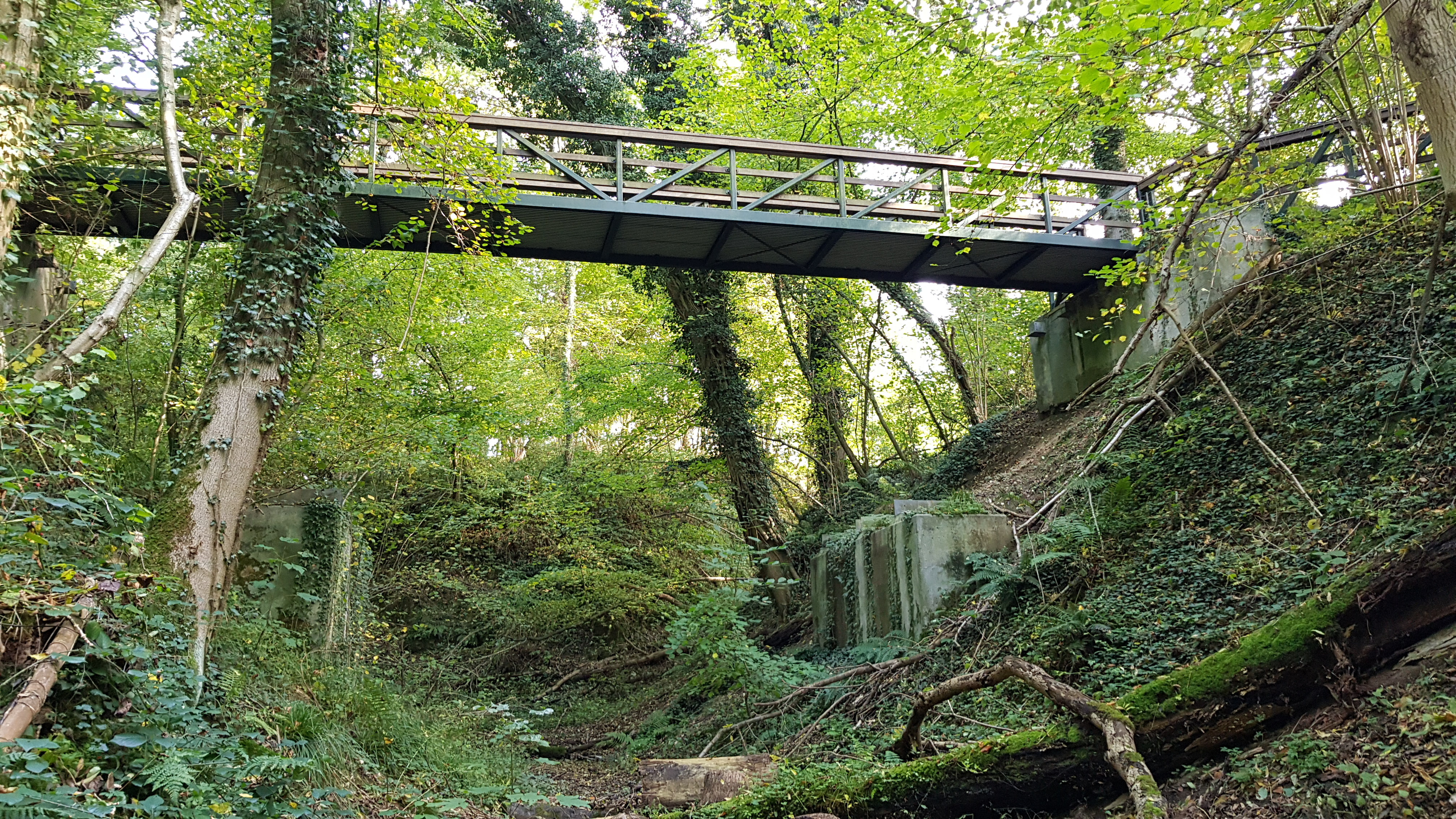 Scheggelderbrug over de Scheggelder Grub, Savelsbos, Nederland